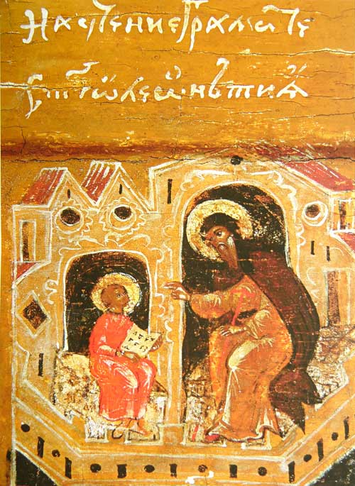 Научение грамоте св. Леонтия. Клеймо иконы «Леонтий Ростовский с житием в 24 клеймах». Ок. 1677 г. 100×78 см. Муромский историко-художественный музей, Муром, Россия. Инв. М-6674.